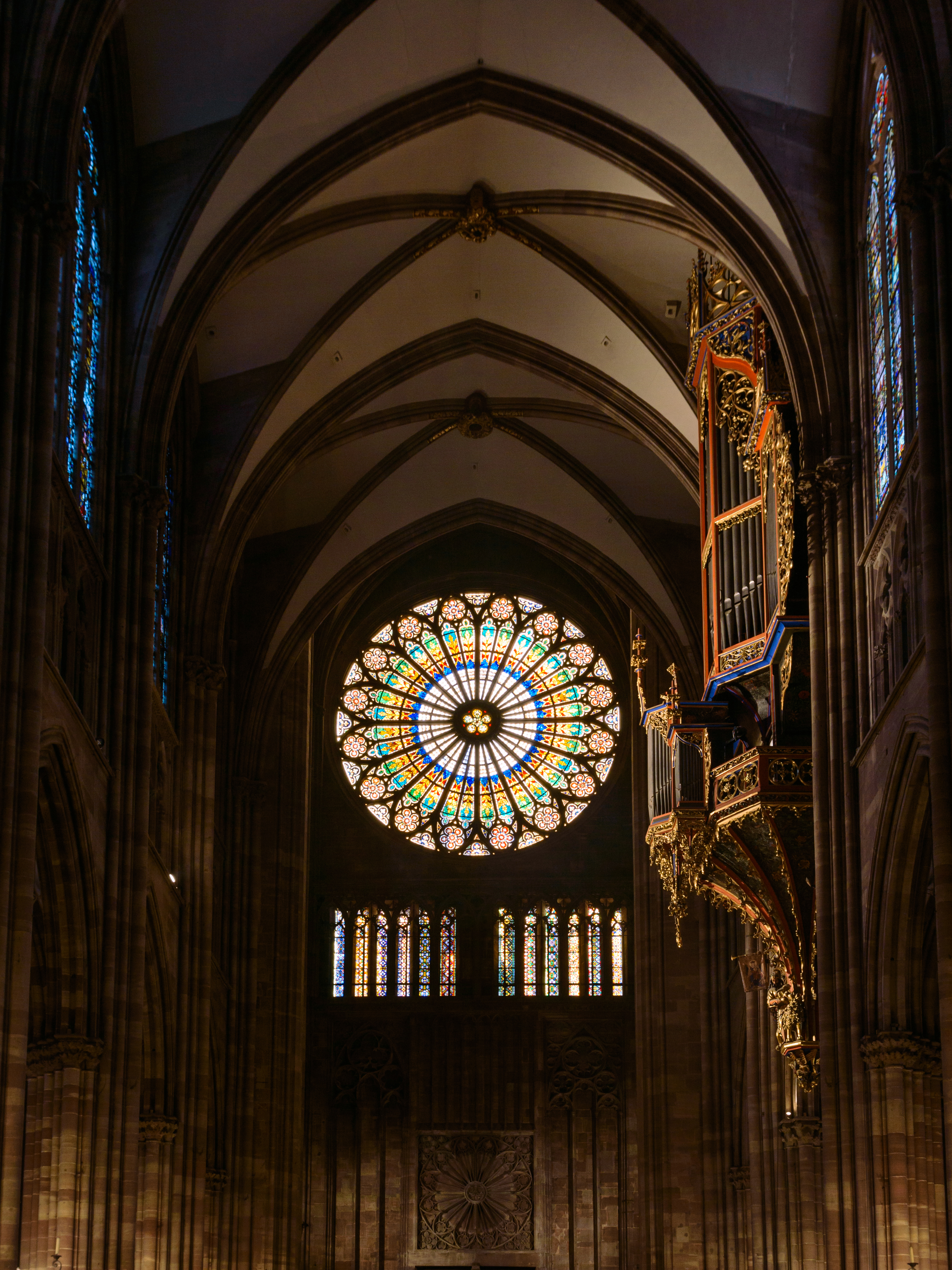 La nef de la cathédrale de Strasbourg, prise le 2 mars 2014.